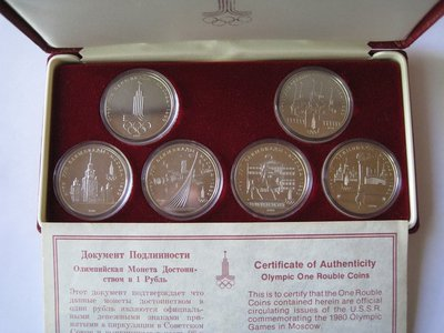 Радянські ювілейні монети в альбомі-планшеті